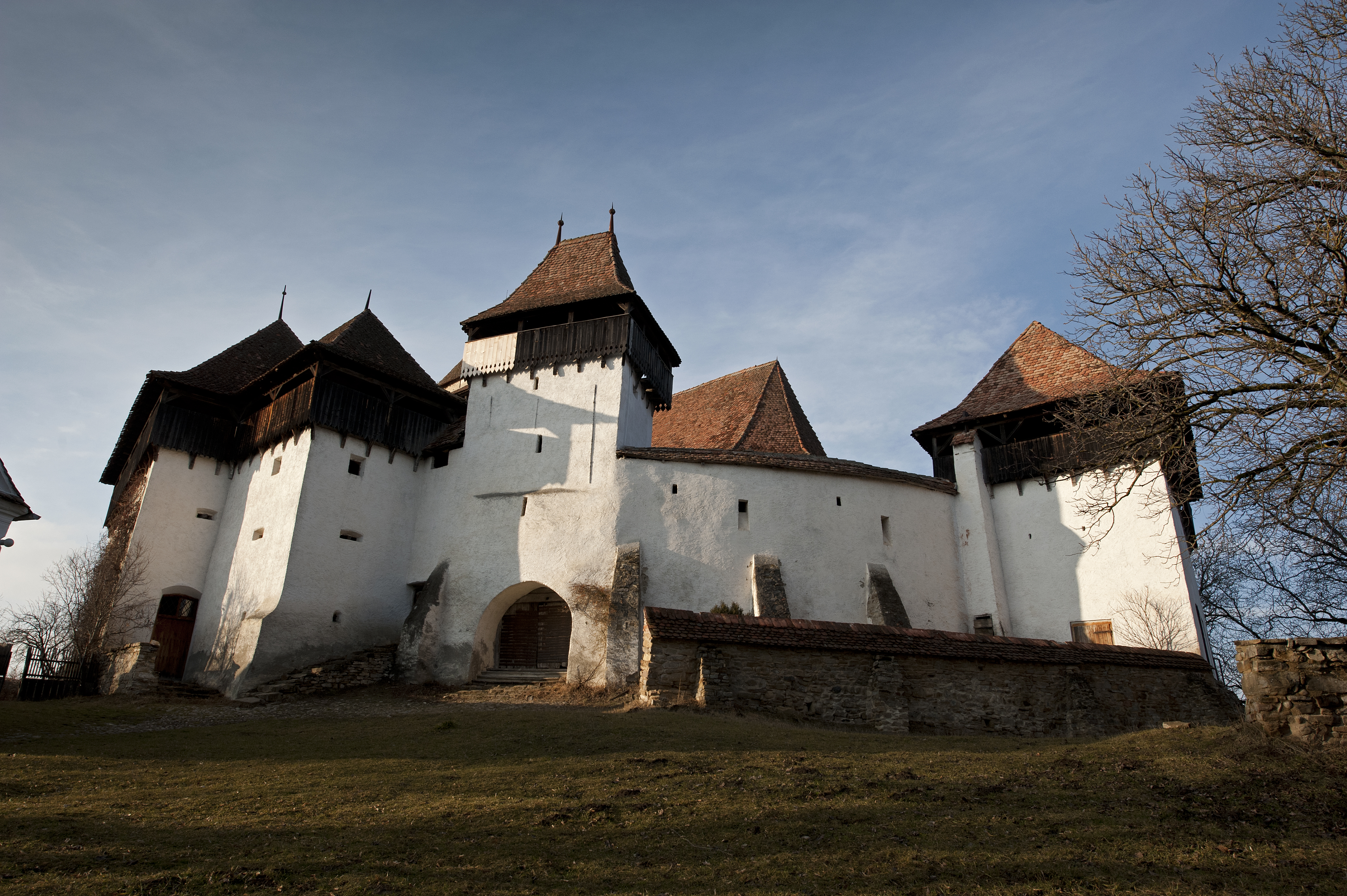 Biserica evanghelică fortificată 01